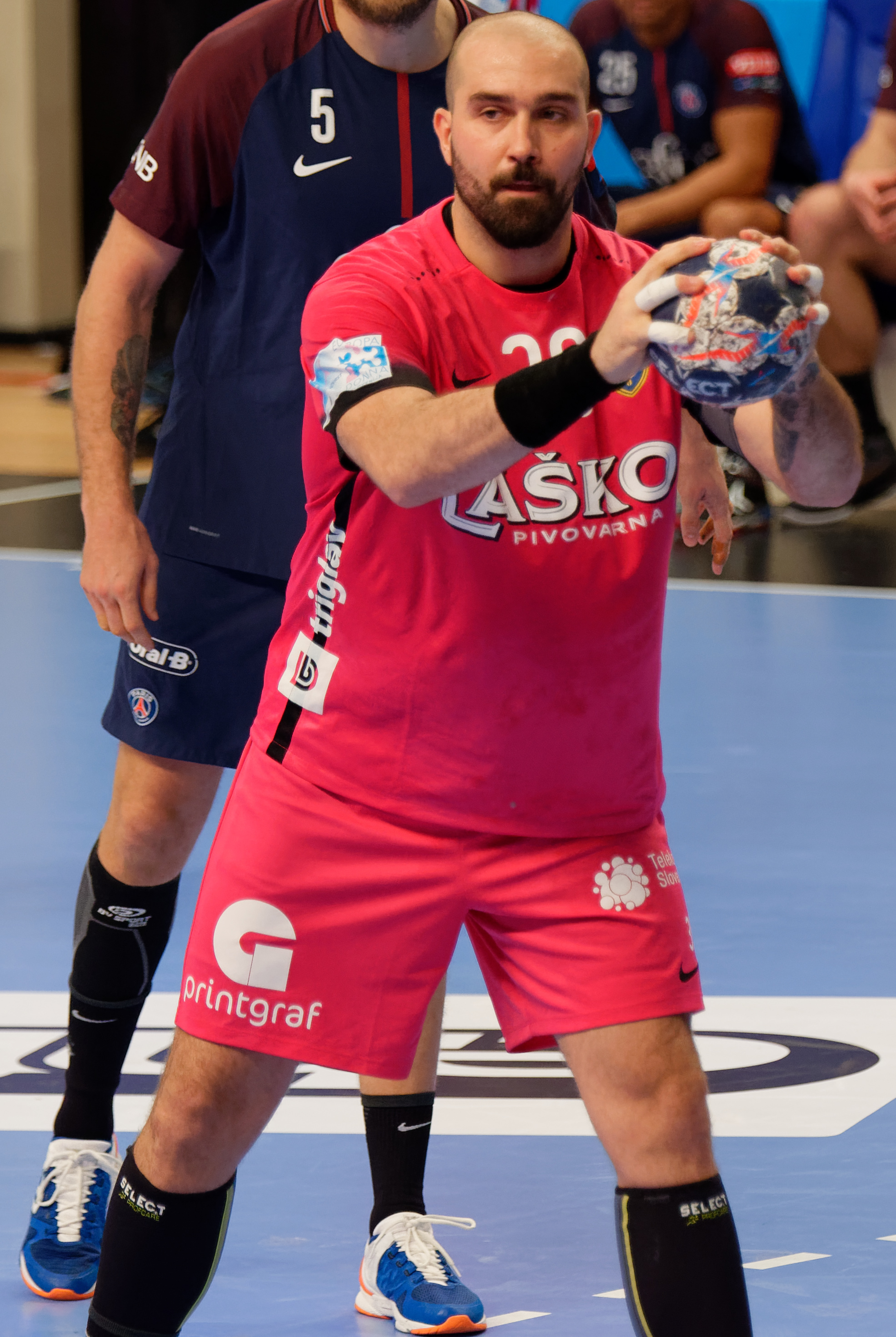 Rencontre de phase de groupe de la ligue des champions 2017/18 entre le PSG et Celje A Coubertin le 8 octobre 2017.